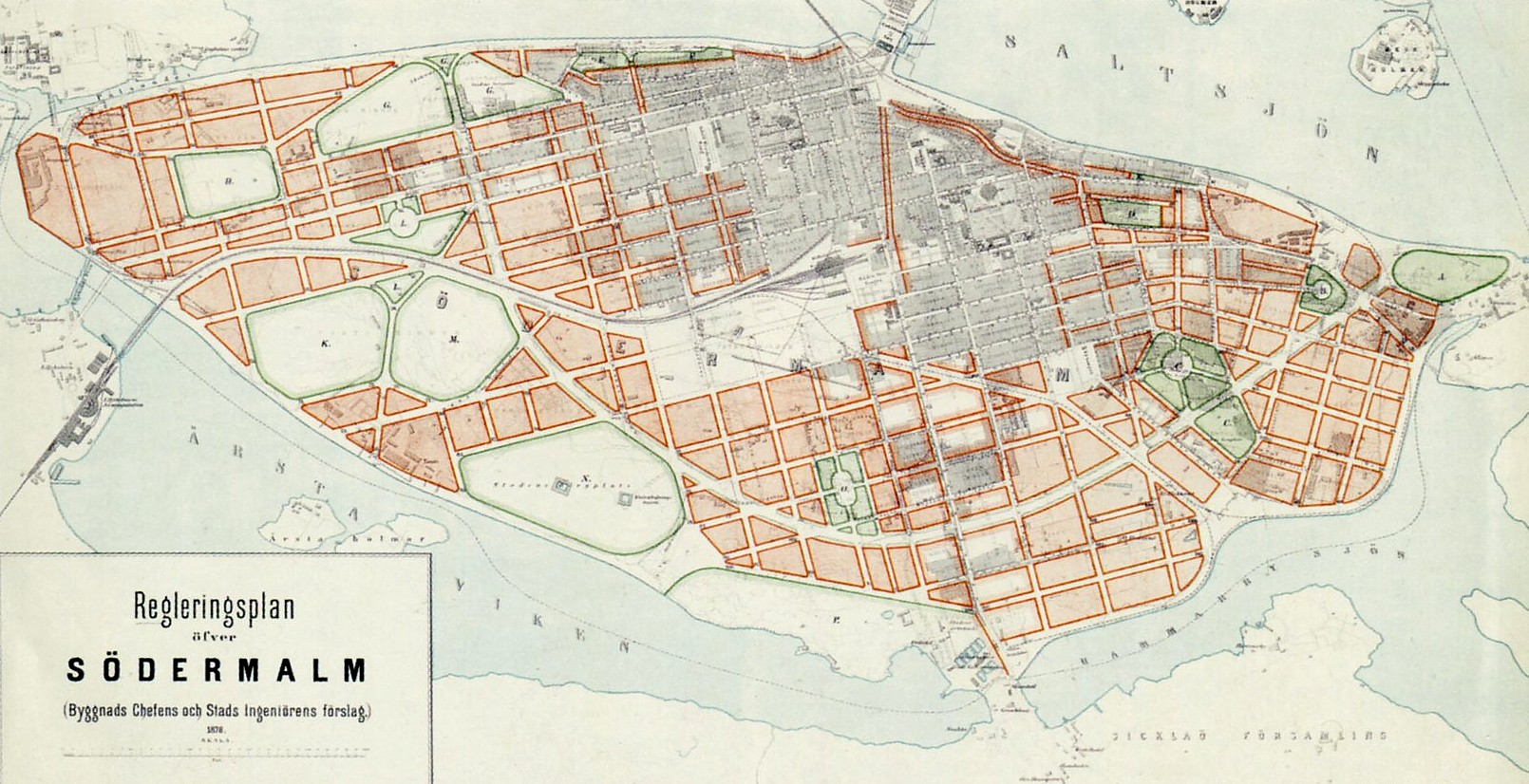 Regleringsplan för Södermalm 1878